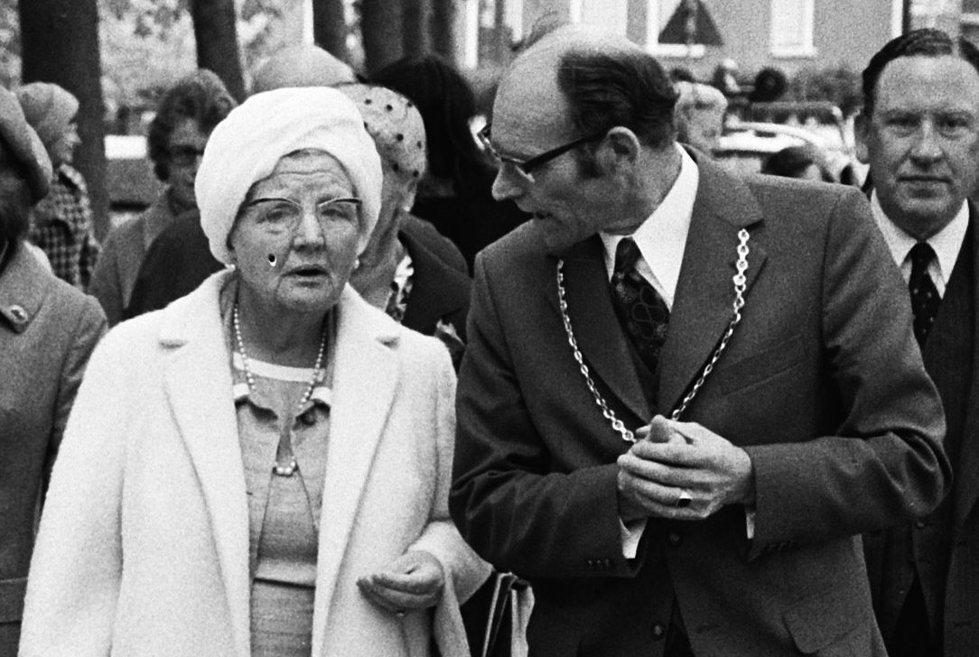 Wandeling door Mantgum, rechts burgemeester Kuiper